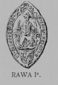 Rawicz Ie